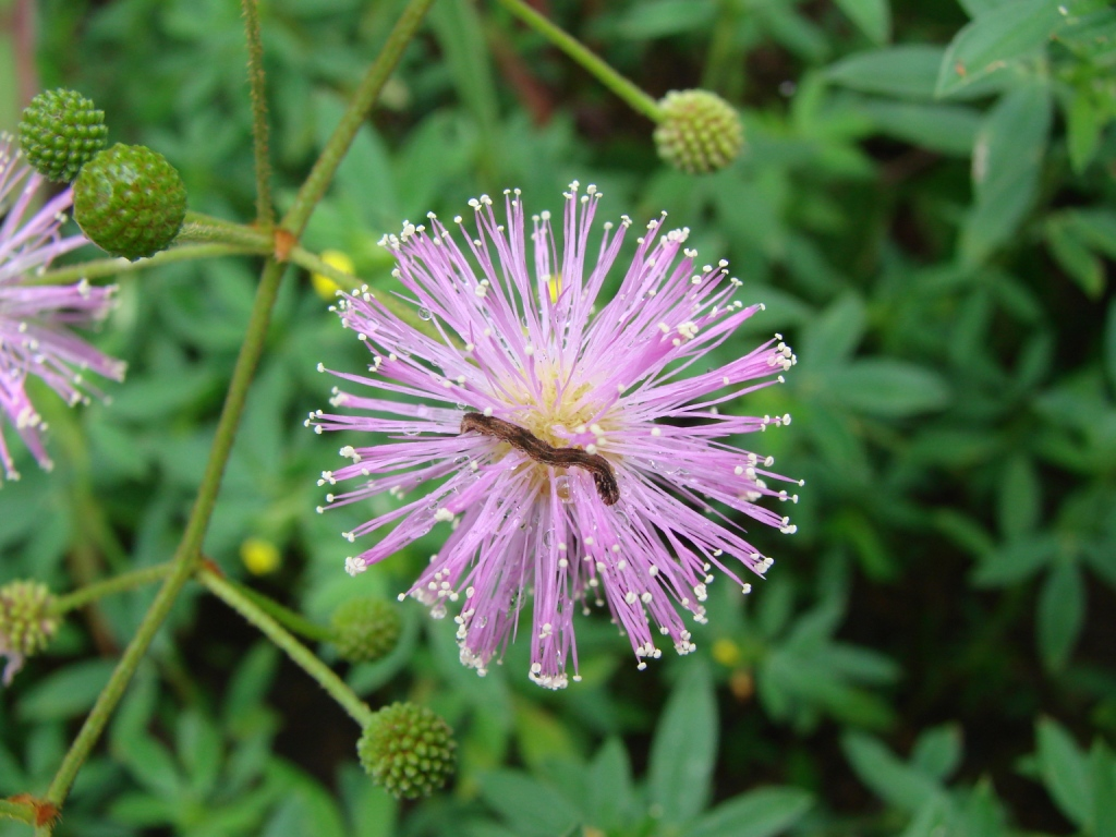 Mimosa sensitiva - FABACEAE BR 242 - Queimada Nova - Bahia - Brasil.